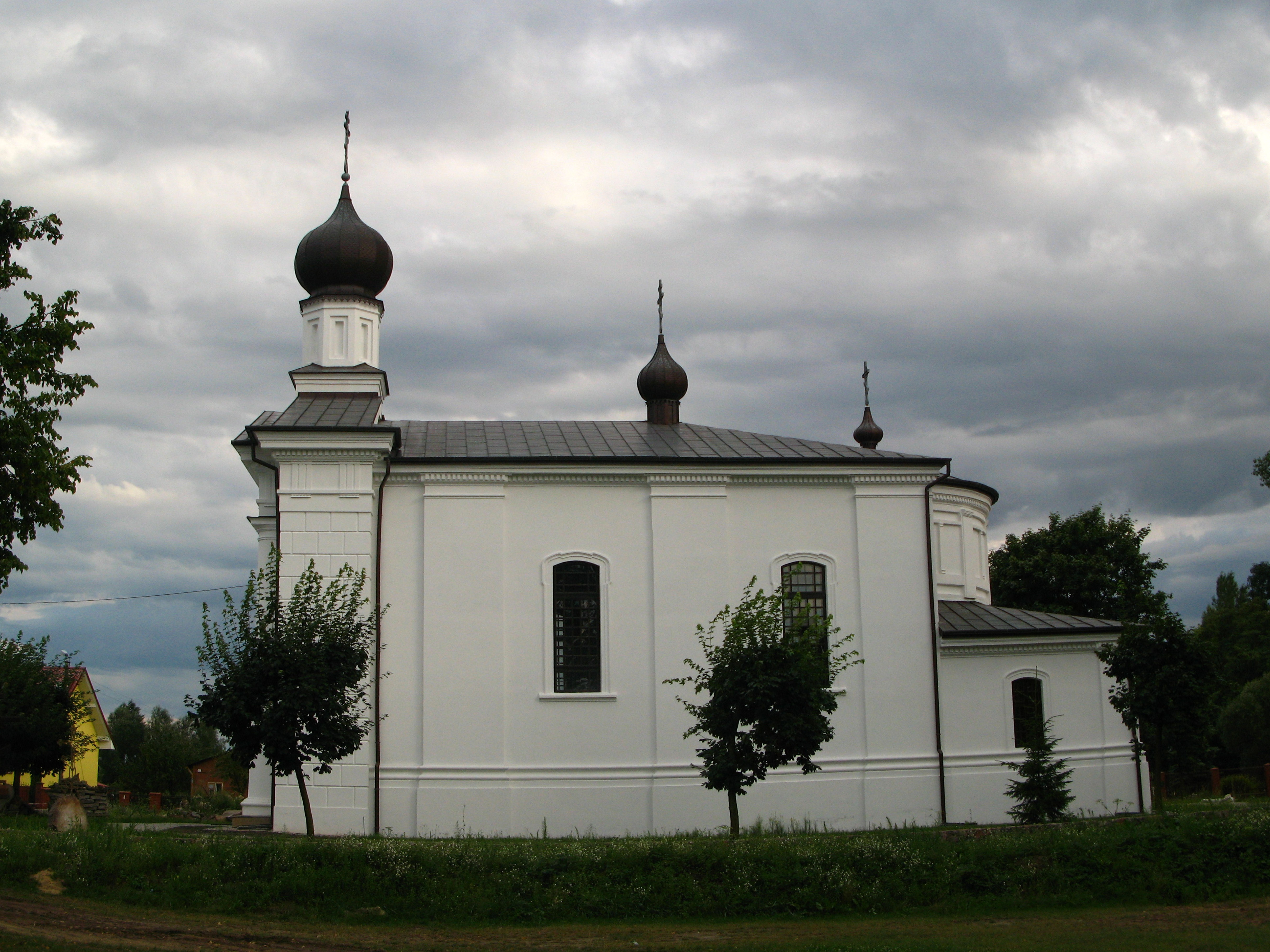 Cerkiew prawosławna p.w. św. Jana Teologa (k. XVIII)DzwonnicaCmentarz cerkiewny ul. Cerkiewna 2, miasto Terespol 04.1958 i z.